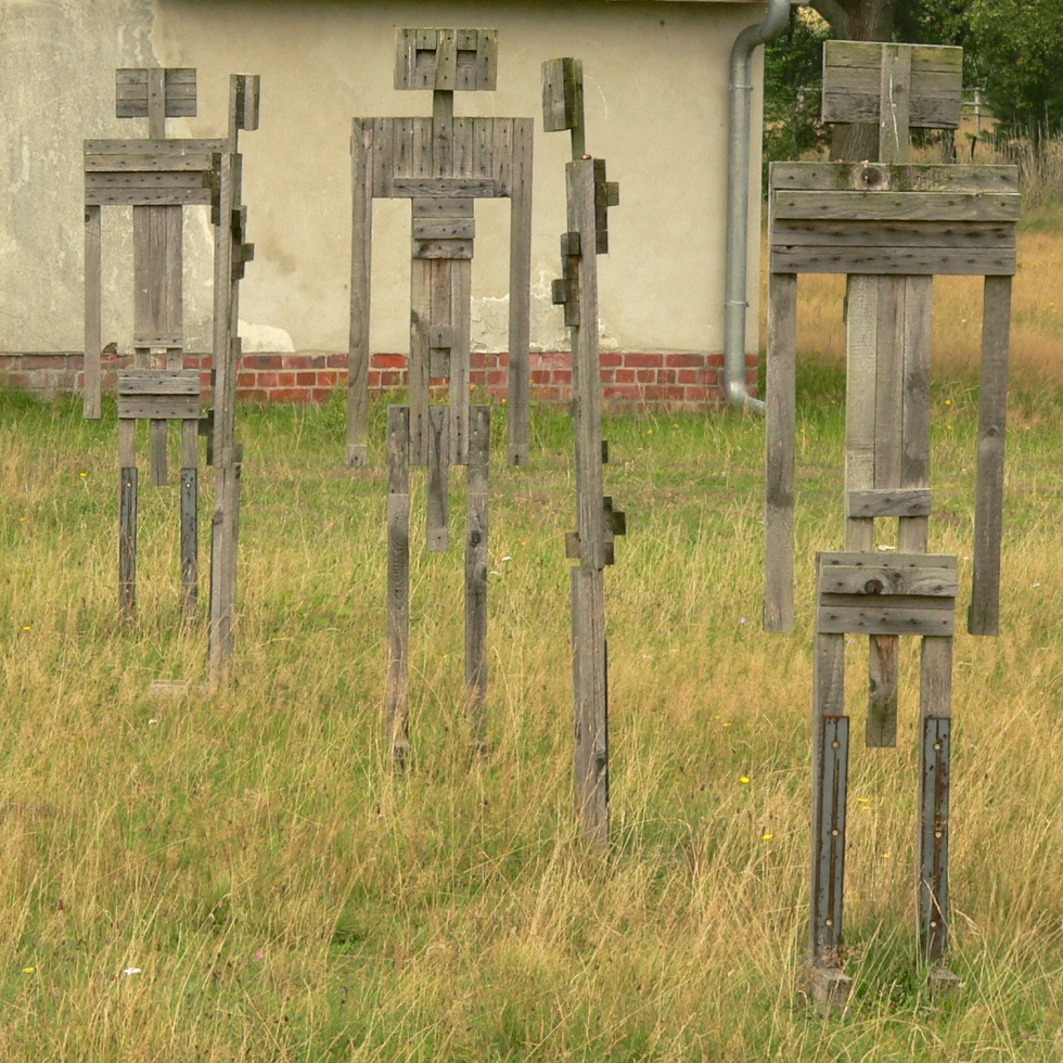 Lattenmensch von Jörg-Werner Schmidt im Camp Reinsehlen